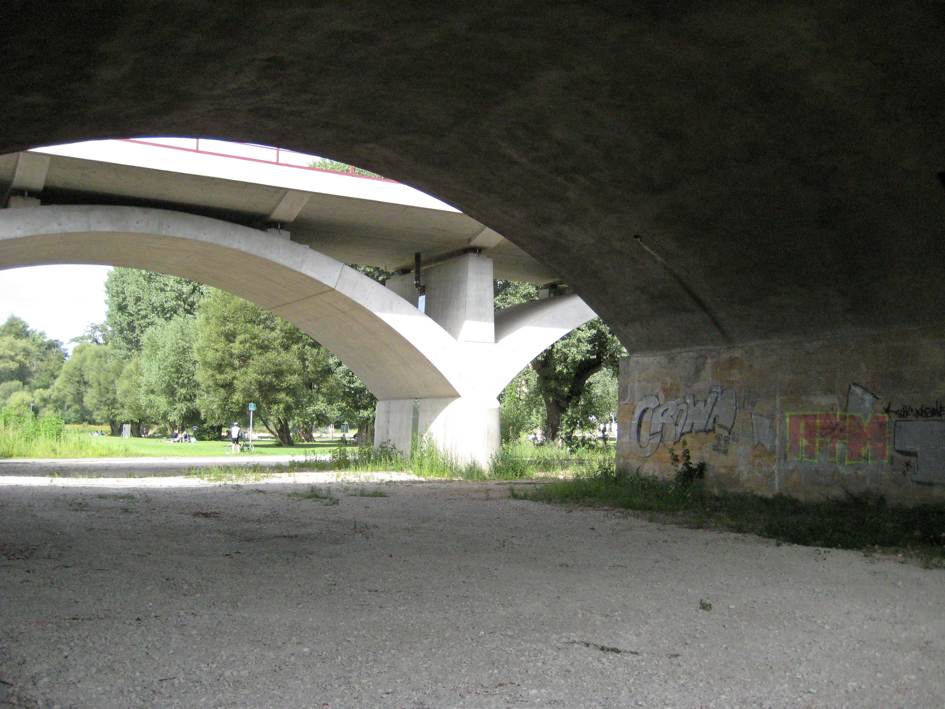 Unterseite des ersten Bogens der Siebenbogenbrücke in Fürth mit neu gebauter Betonbrücke für die S-Bahn im Hintergrund.